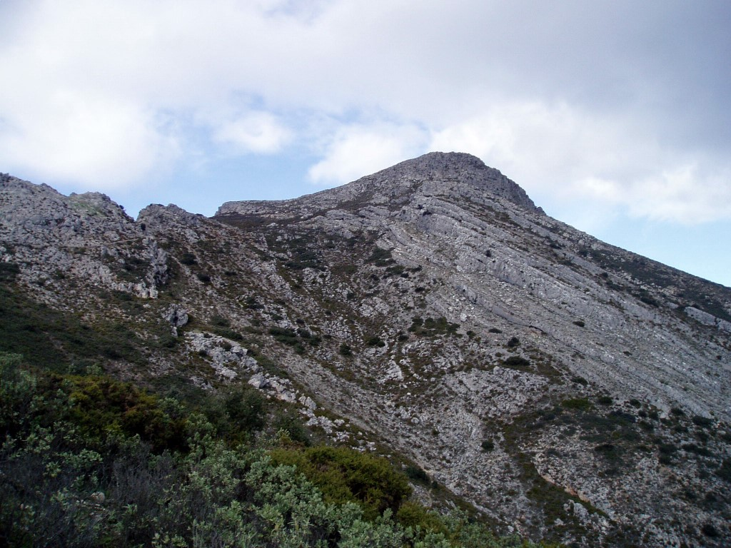 Pico del Grajo